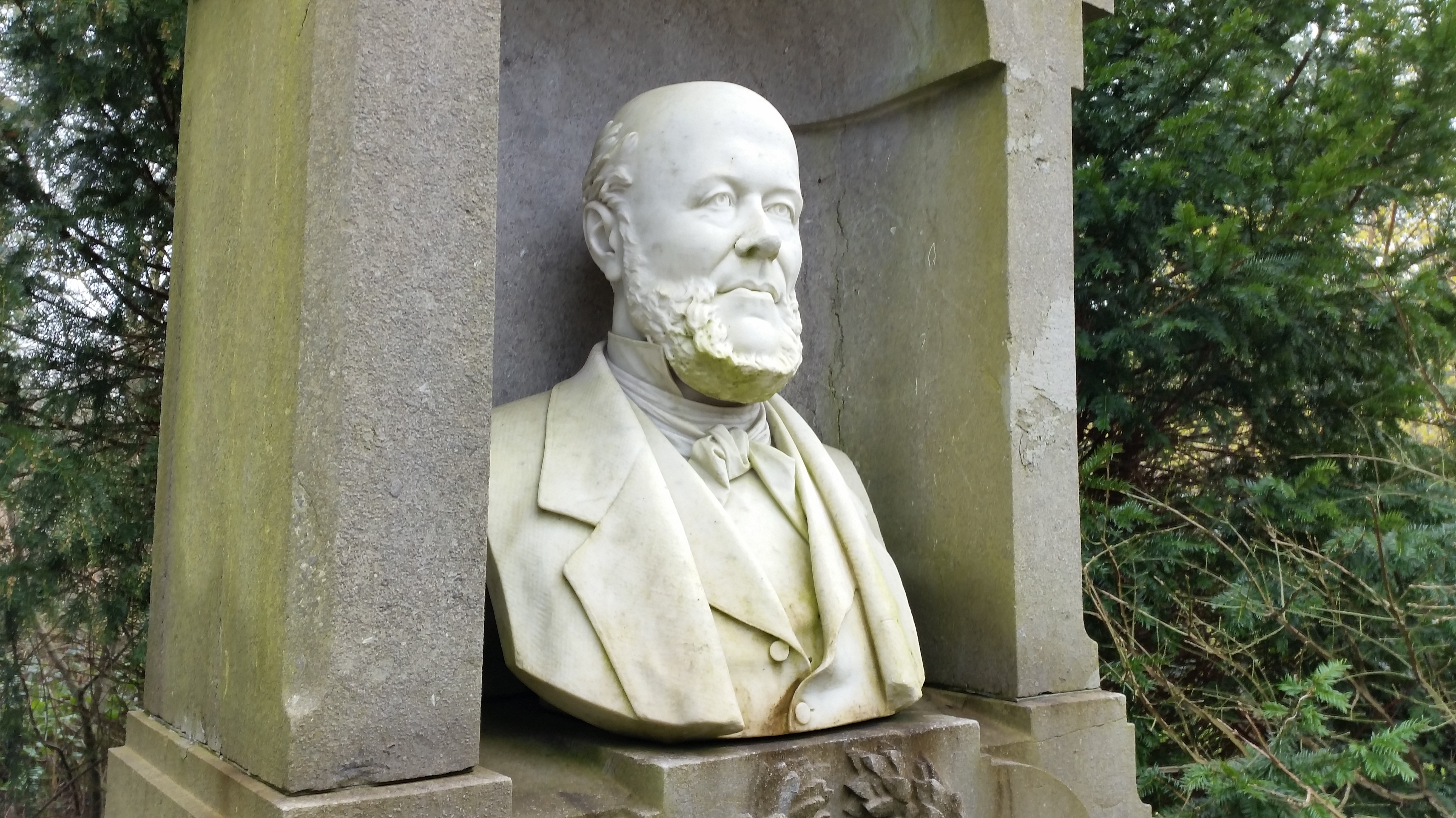 Grafmonument van Potgieter met borstbeeld van Stracké op De Nieuwe Ooster, Amsterdam-Oost. (februari 2020)